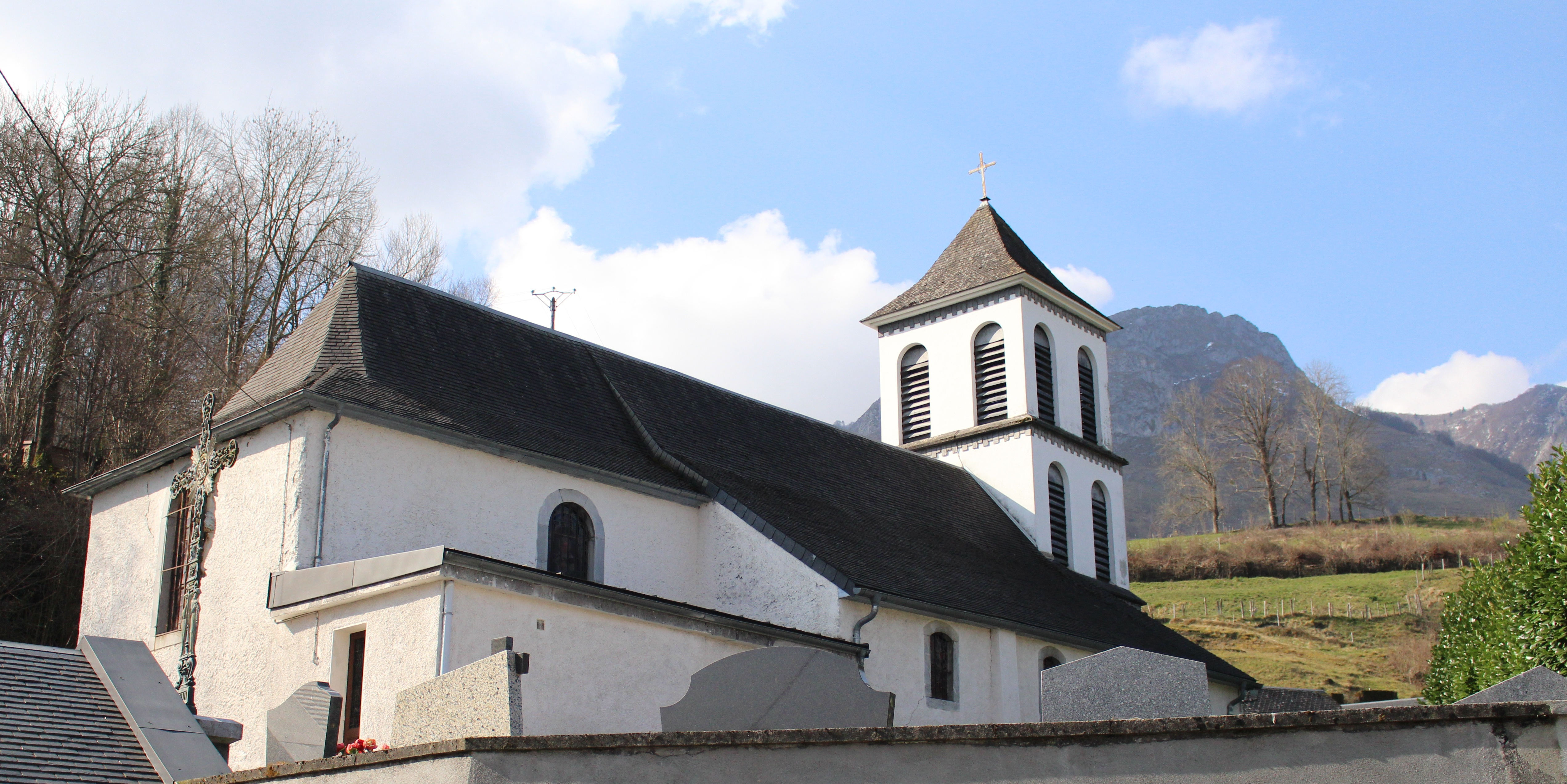 Église Saint-Jacques d'Ossen (Hautes-Pyrénées)